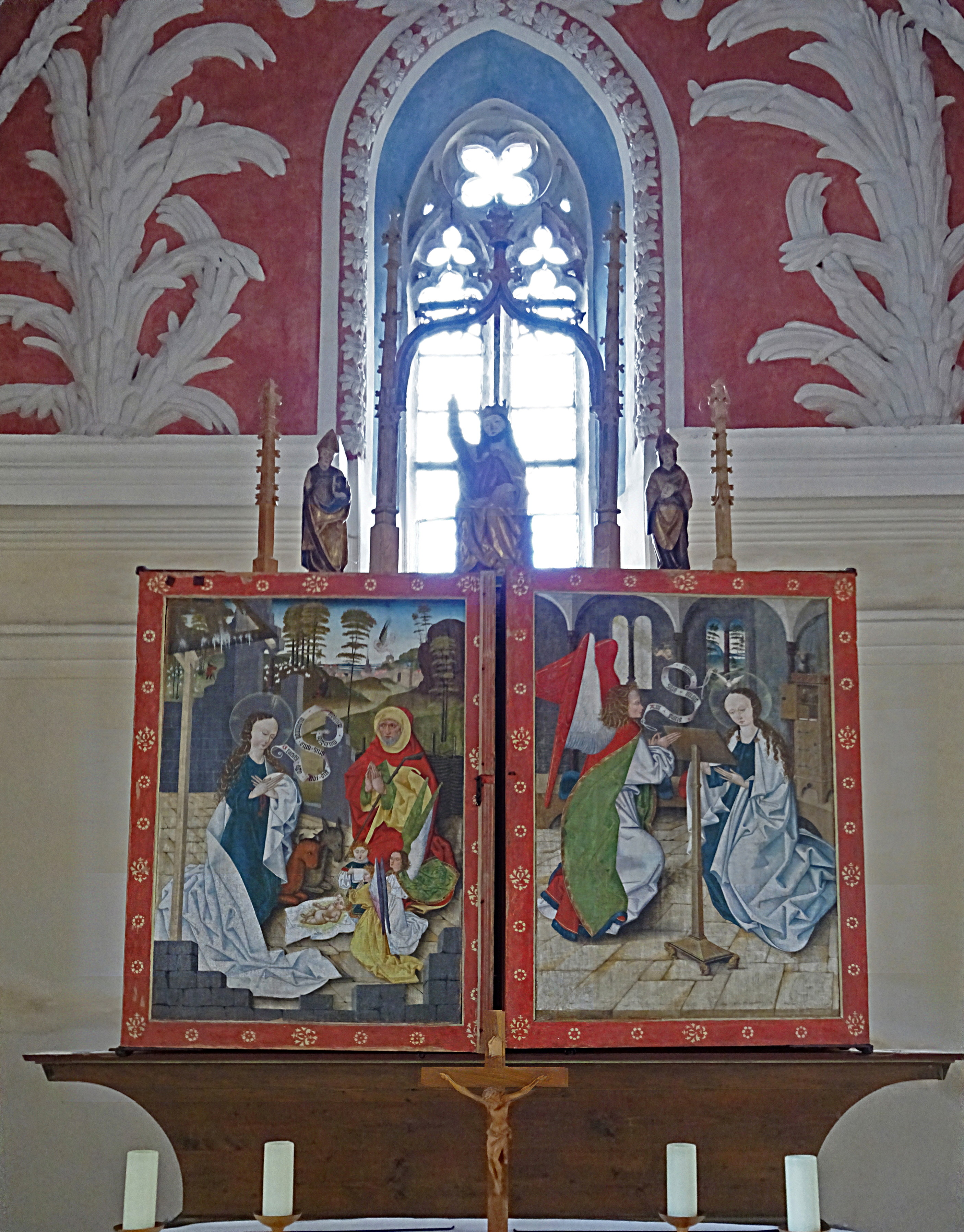 Wandelaltar vom Meister des Schwarzaer Altars (1487) in der Kirche St. Simon und Juda (Neunhofen), geschlossen